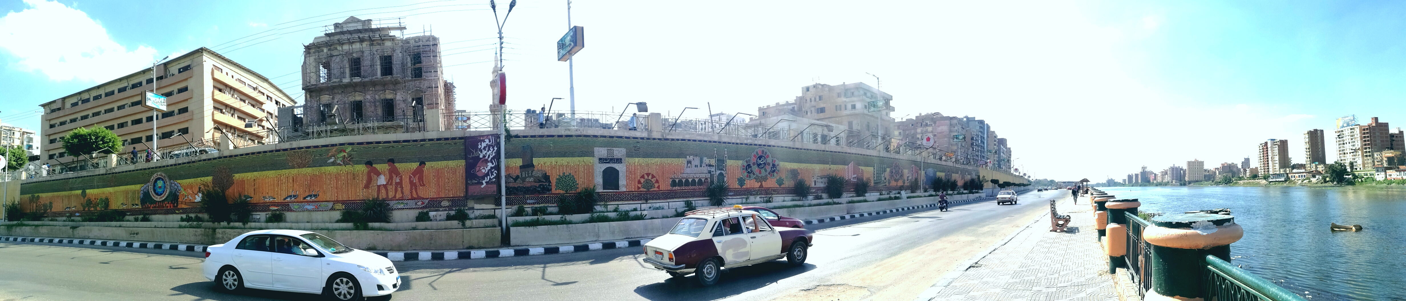 صورة بانورامية من مدينة المنصورة عاصمة محافظة الدقهلية ،إحدى أكبر محافظات جمهورية مصر العربية.